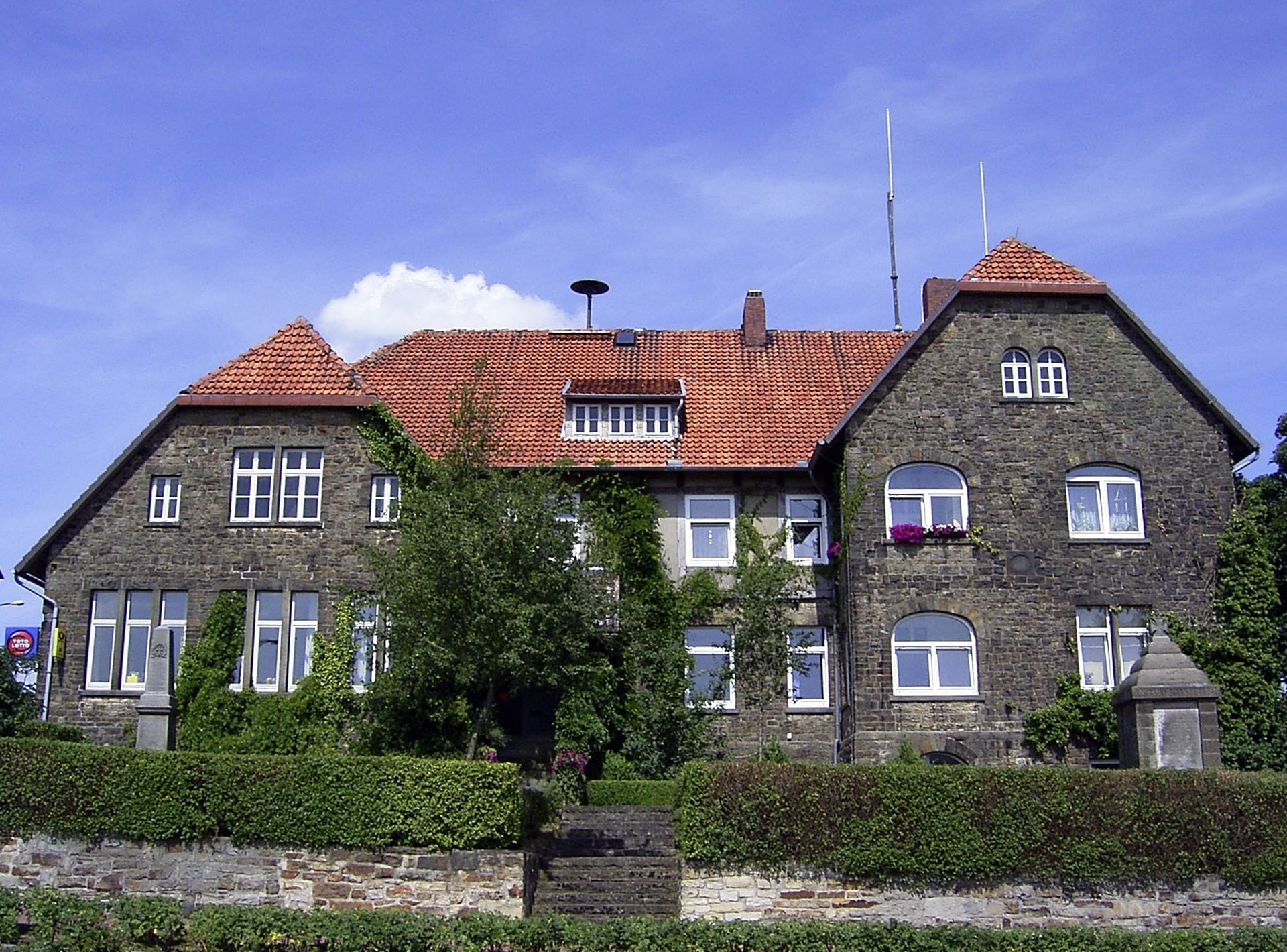 Alte Schule Wölpinghausen, Landkreis Schaumburg, Niedersachsen.